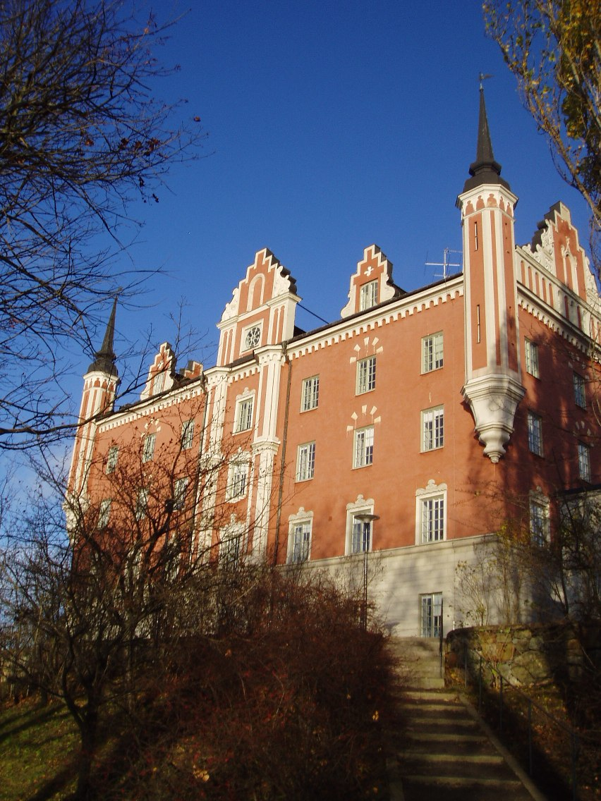 Amiralitetshuset, Norrmalm, Stockholm